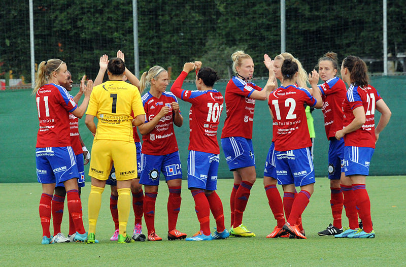 Vittsjö GIK before a match at AIK, August 2014